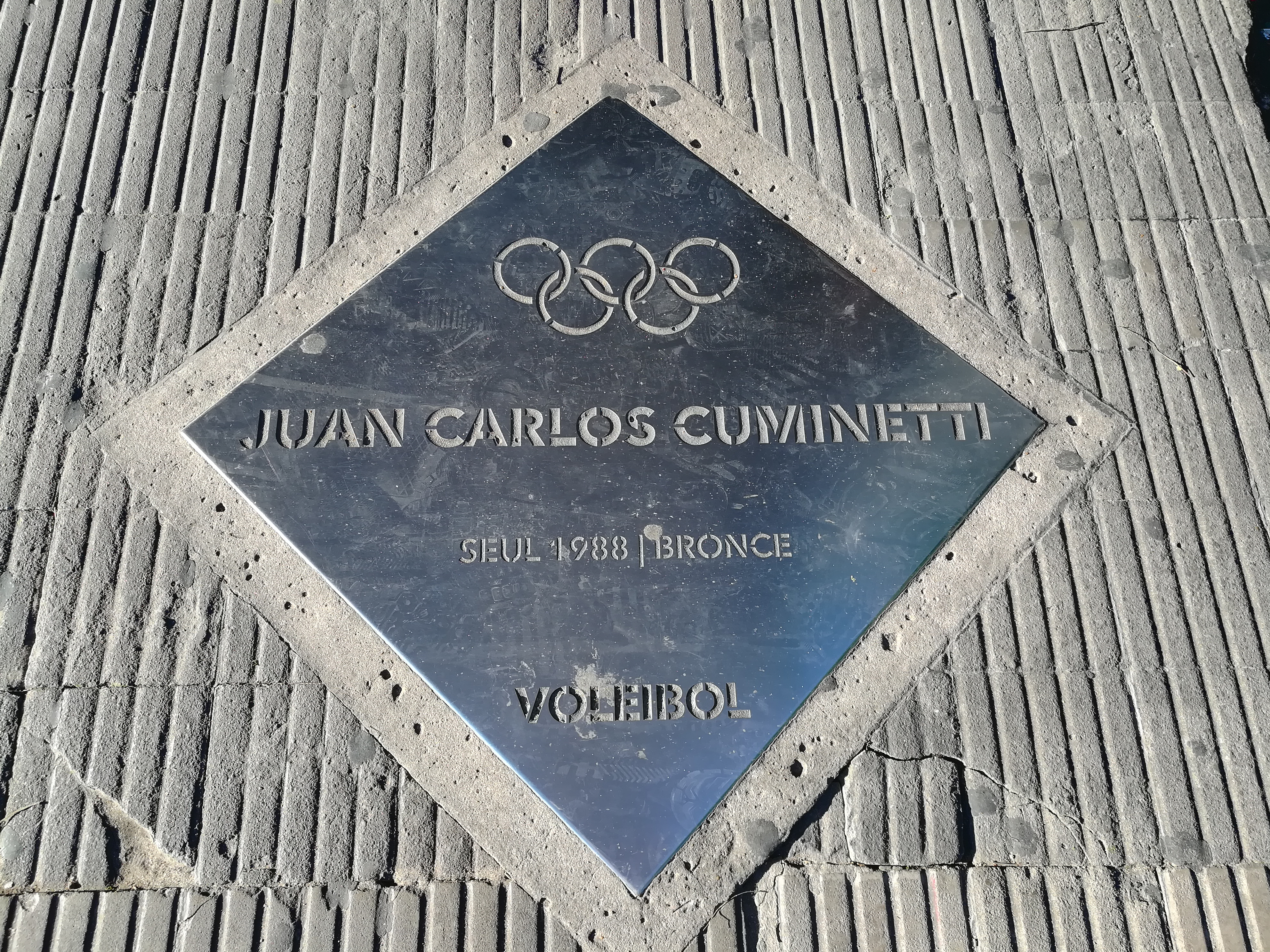 Paseo de los Olímpicos de los en la Avenida Pellegrini (Rosario).